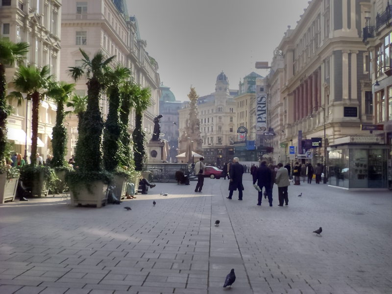 Graben in Wien